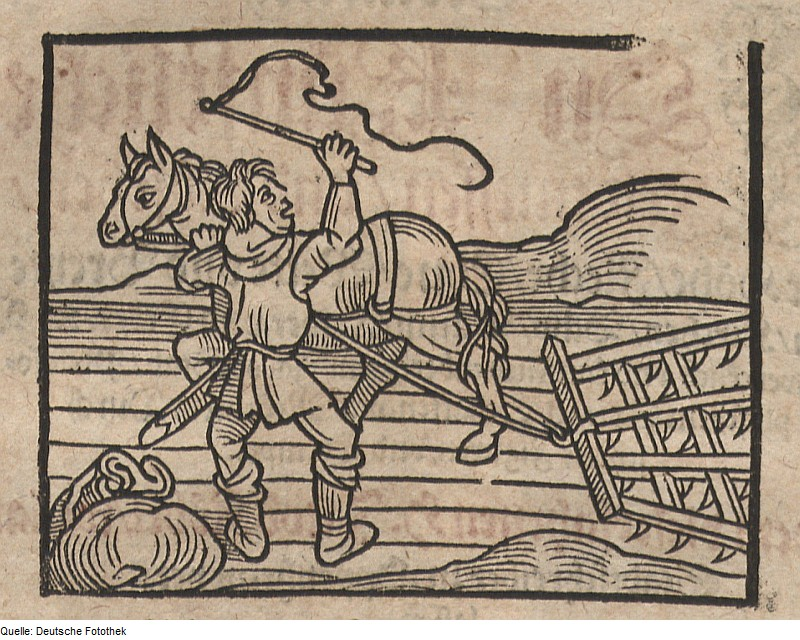 Original image description from the Deutsche Fotothek Ackerbau & Pferd & Egge